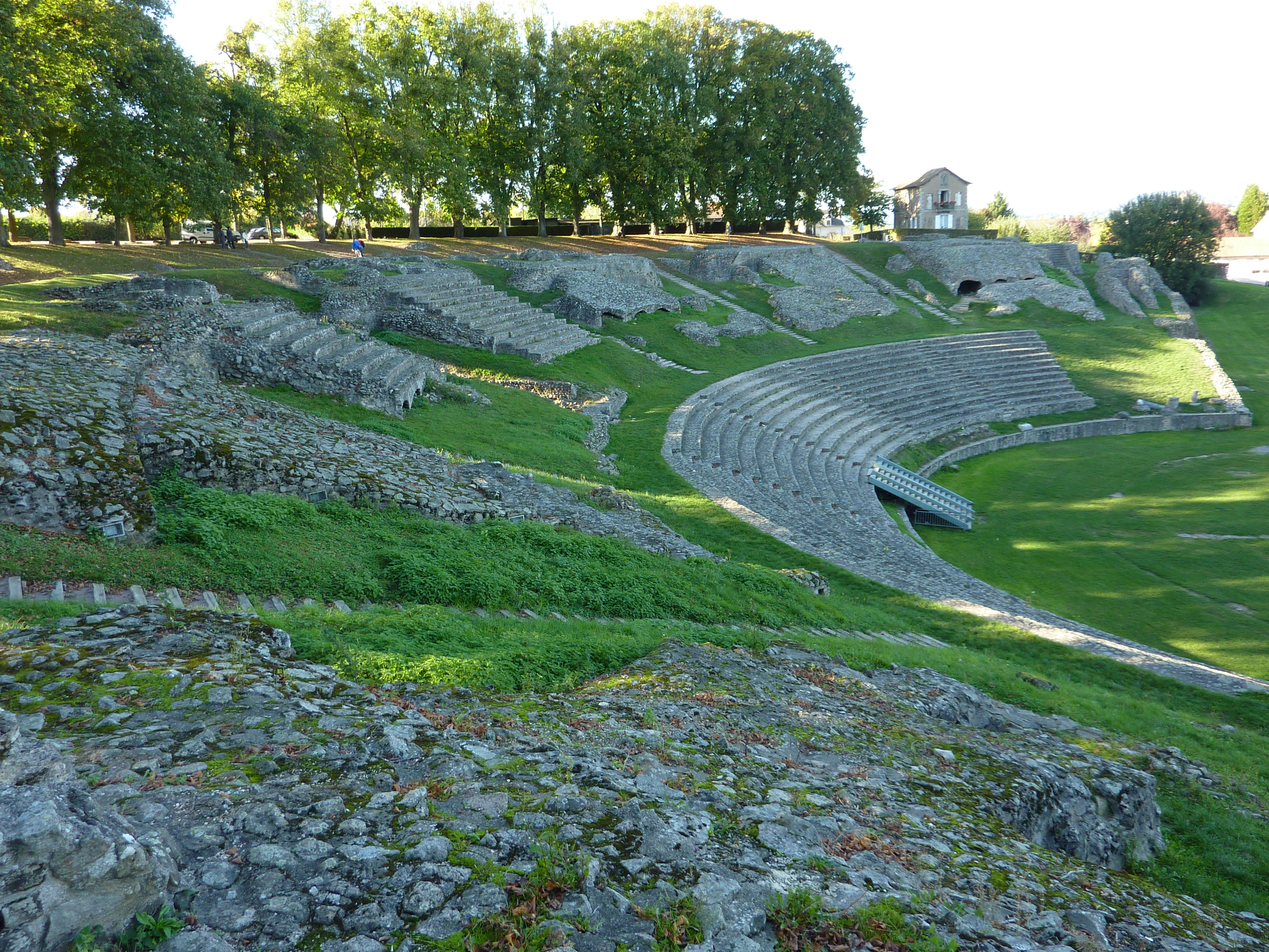 Théâtre romain d'Autun (Saône-et-Loire, France)